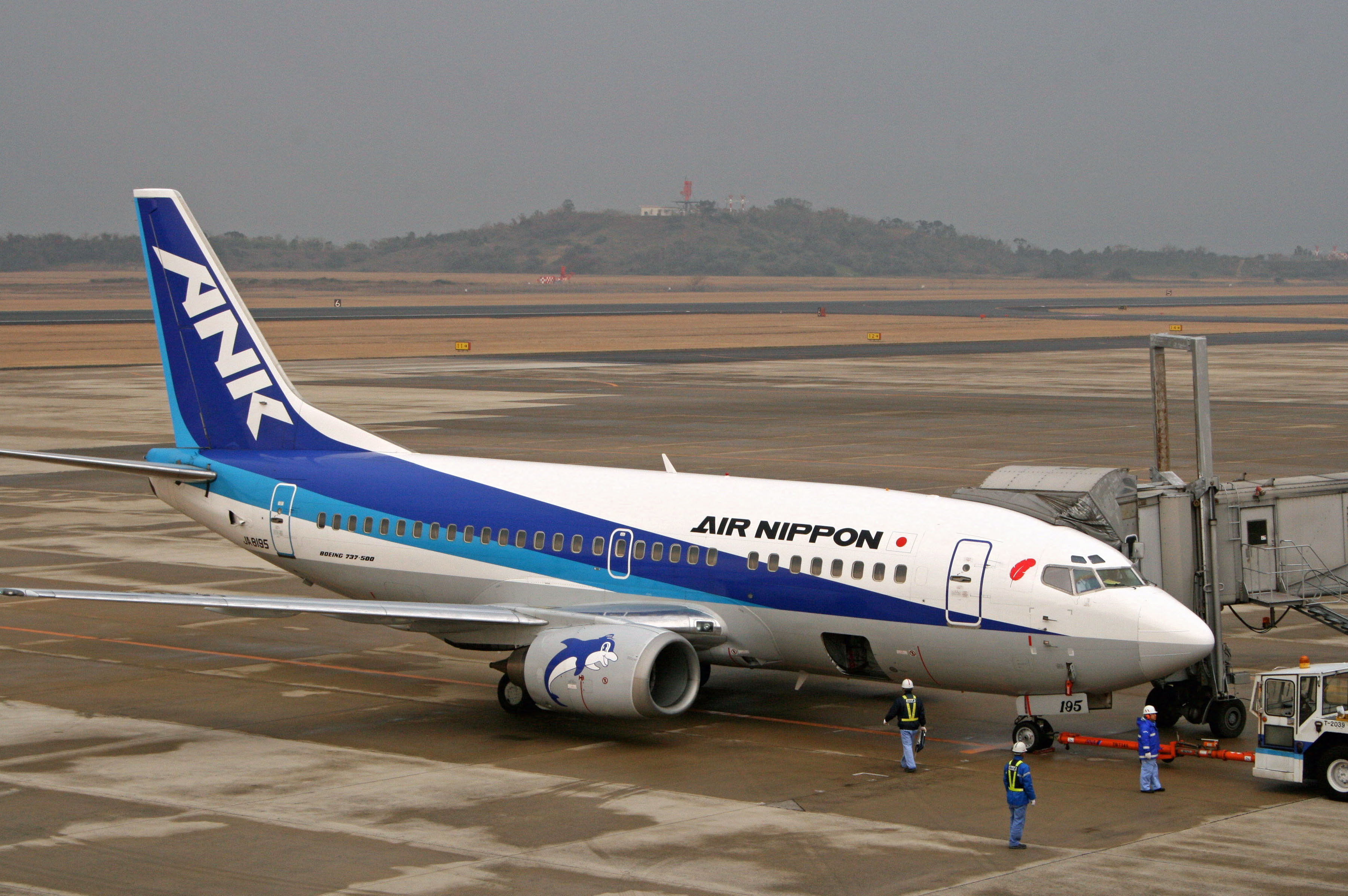 Air Nippon Boeing 737-500(JA8195, taken at Nagasaki Airport)